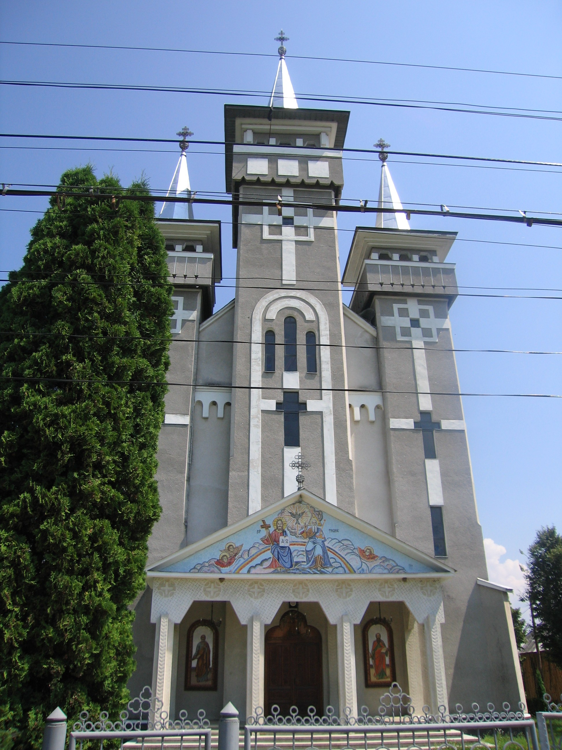 Biserica ortodoxa, Lapusul Romanesc, Maramures